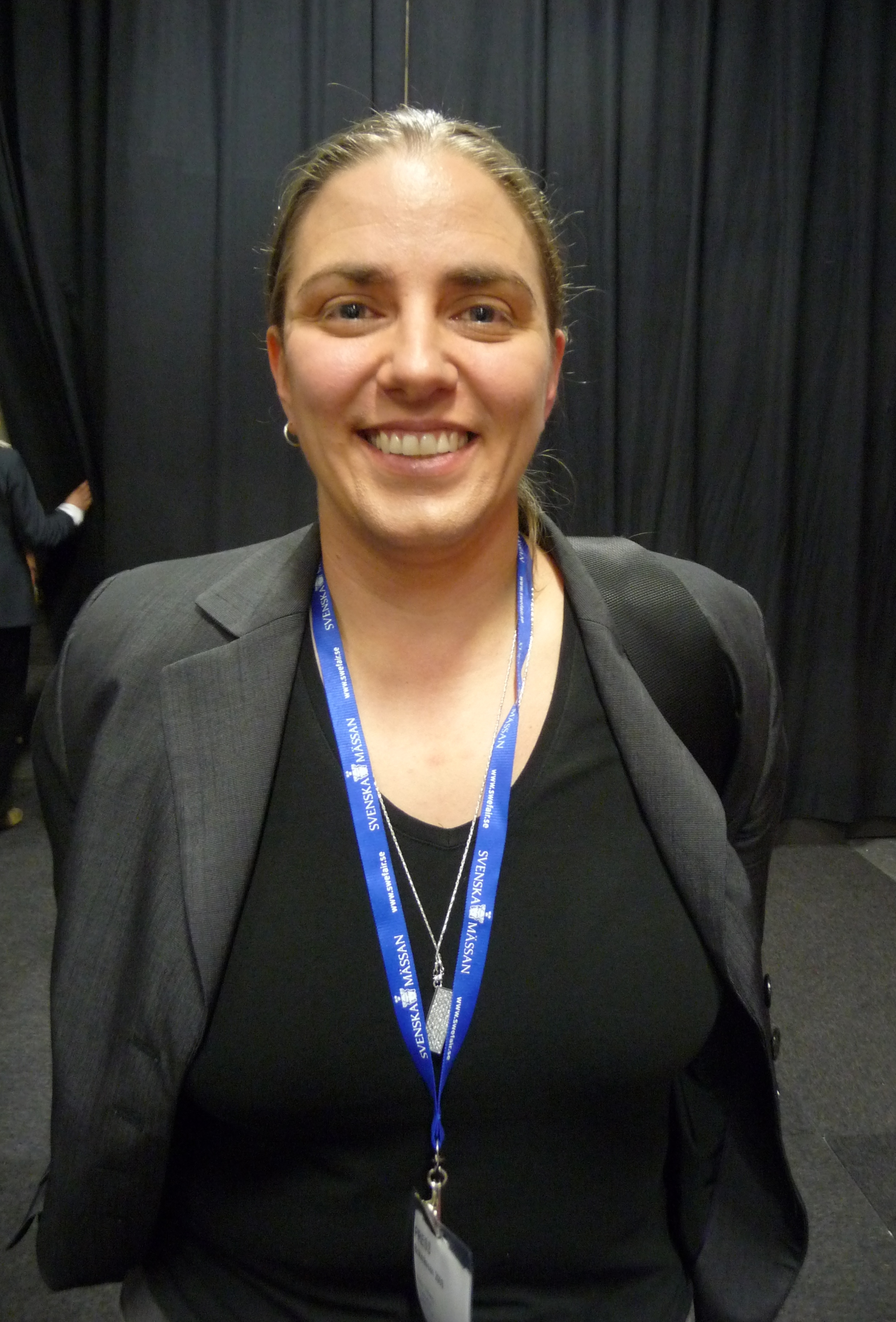 Anna Troberg på bokmässan i Göteborg 2009.